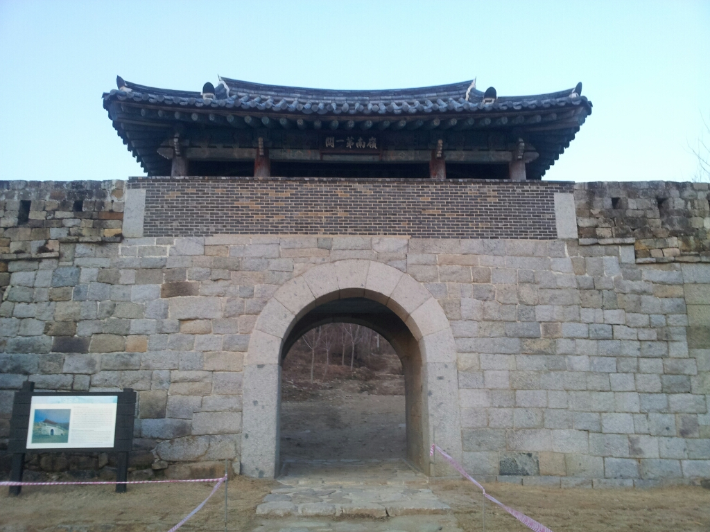 Gasansanseong fortress